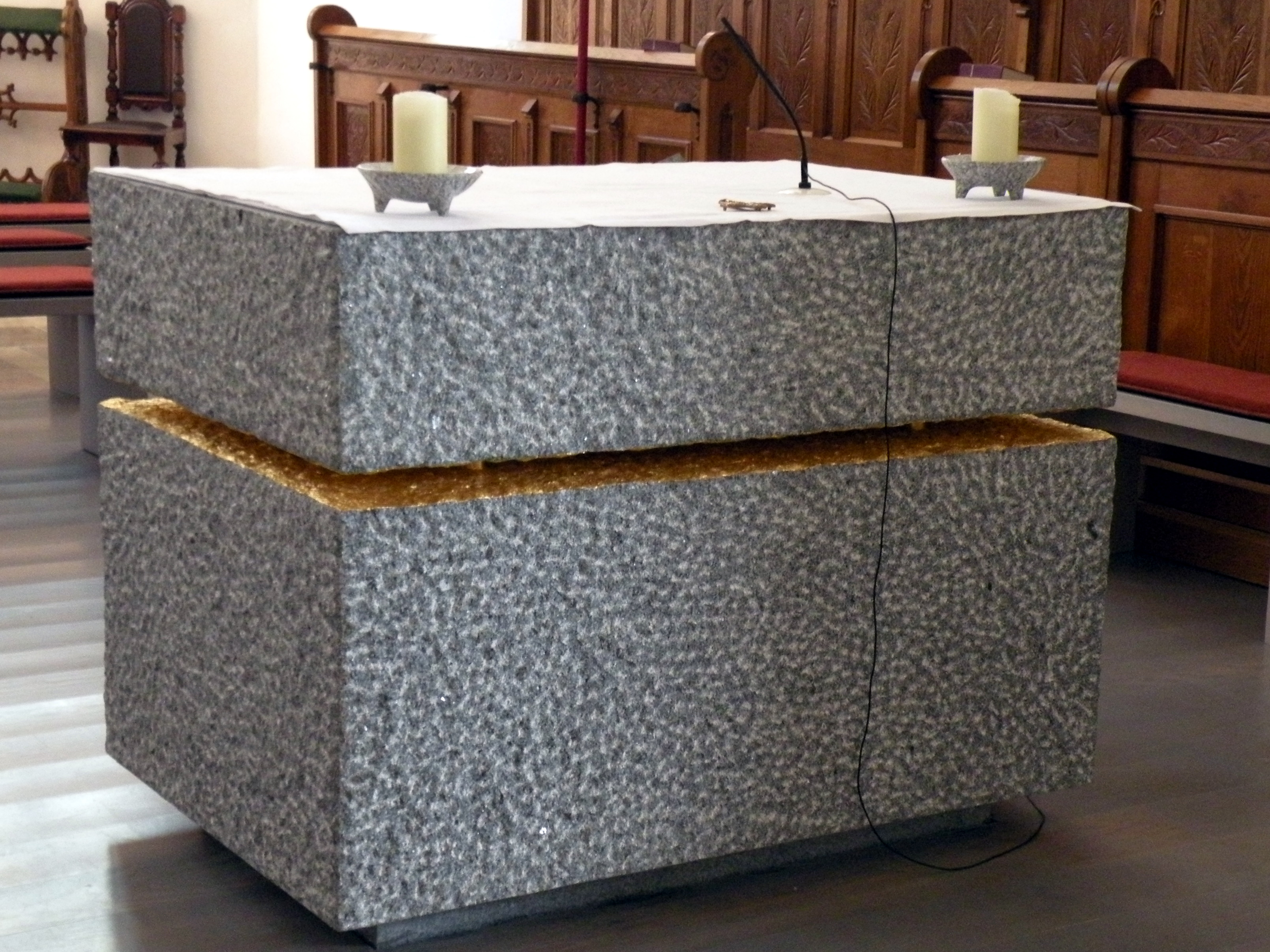 Neuer Altar der Pfarrkirche Pergkirchen (seit 2009)